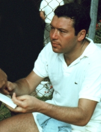 Nicola Pietrangeli under ett besök i Sverige år 1964.